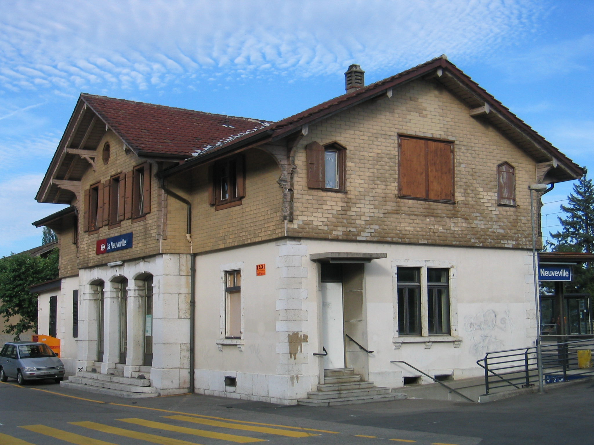 Bahnhof la Neuveville/BE Schweiz